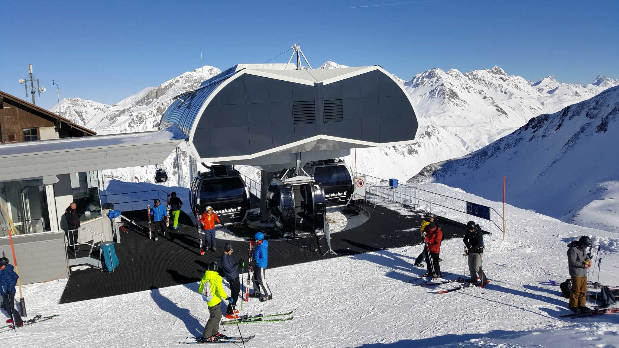 Bergstation der 10-MGD Albonabahn II